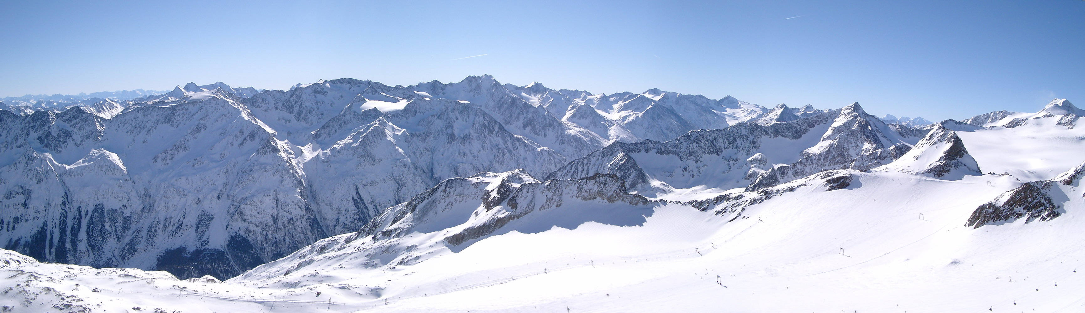 Sölden Tiefenbach Gletscher Skiing area, Panorama von Ostsüdost (Dolomiten mit Sas Rigais, Civetta, Langkofel, Marmolada) über Süden (Ramolkögel, Hintere Schwärze)nach Südwest (Wildspitze)